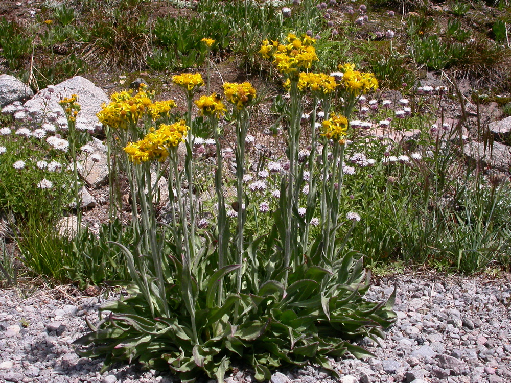 Senecio scorzonella